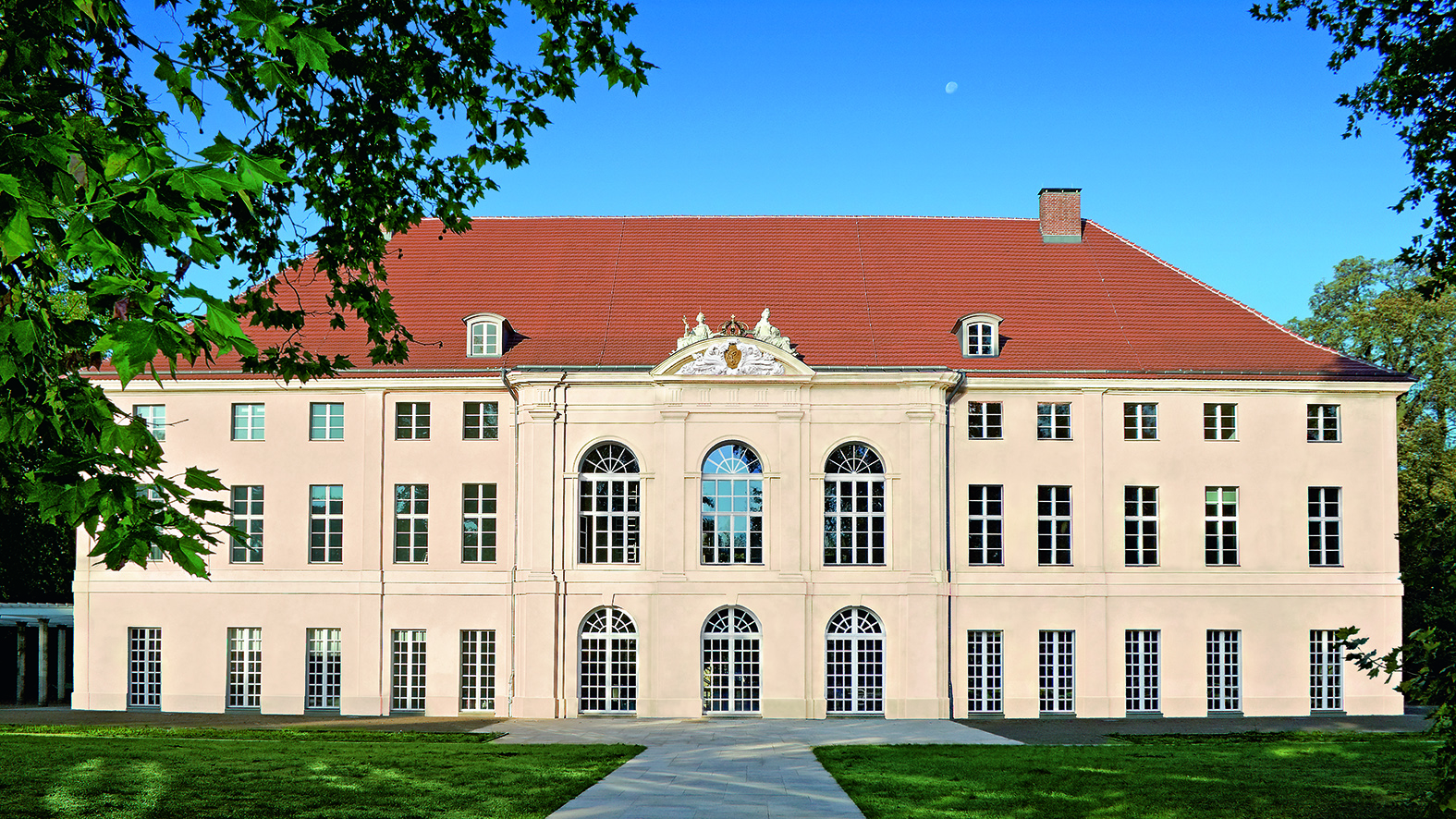 Schloss Schönhausen erstrahlt in neuem Glanz.